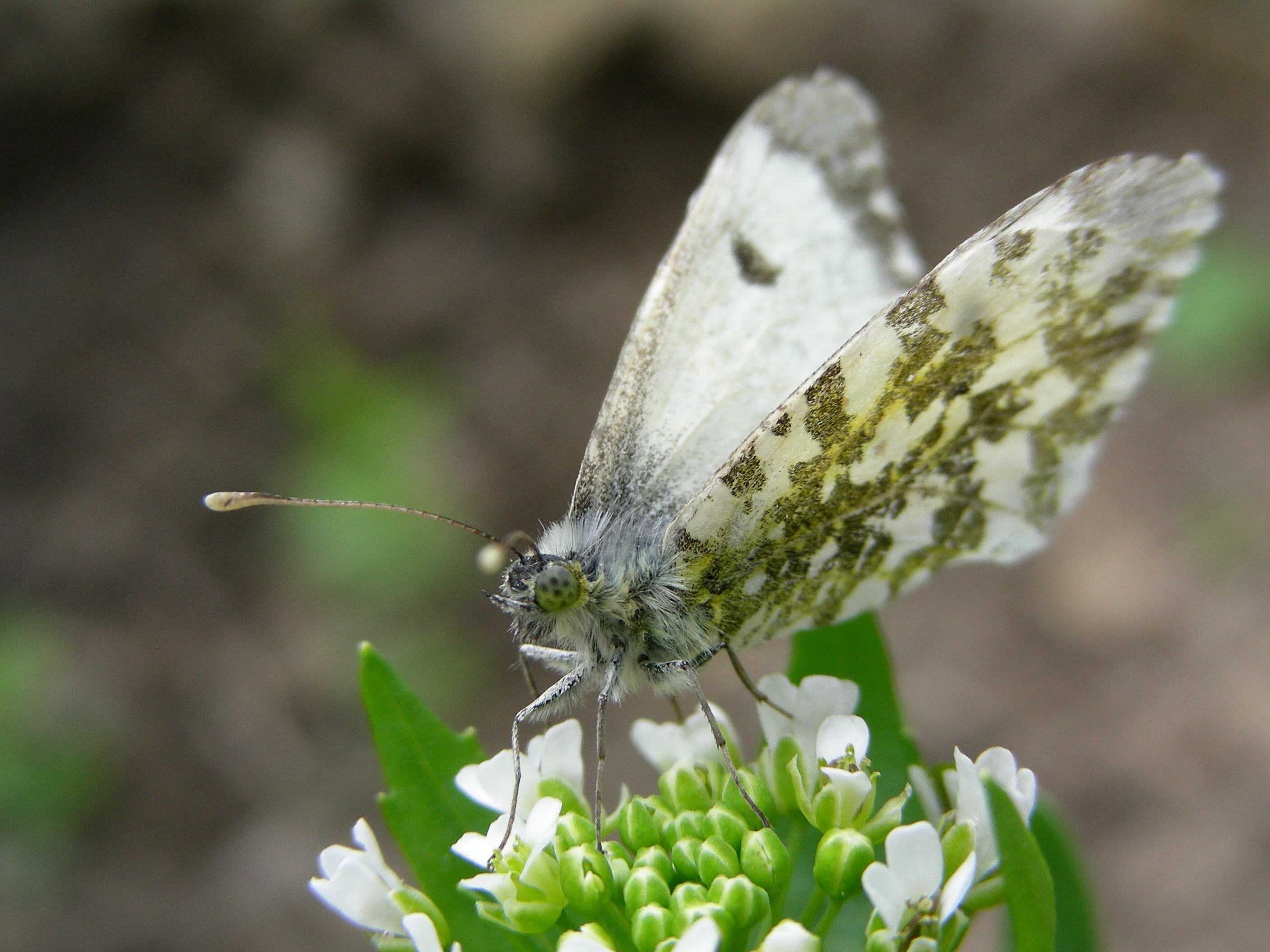 Aurorafalterweibchen auf Knoblauchhederich